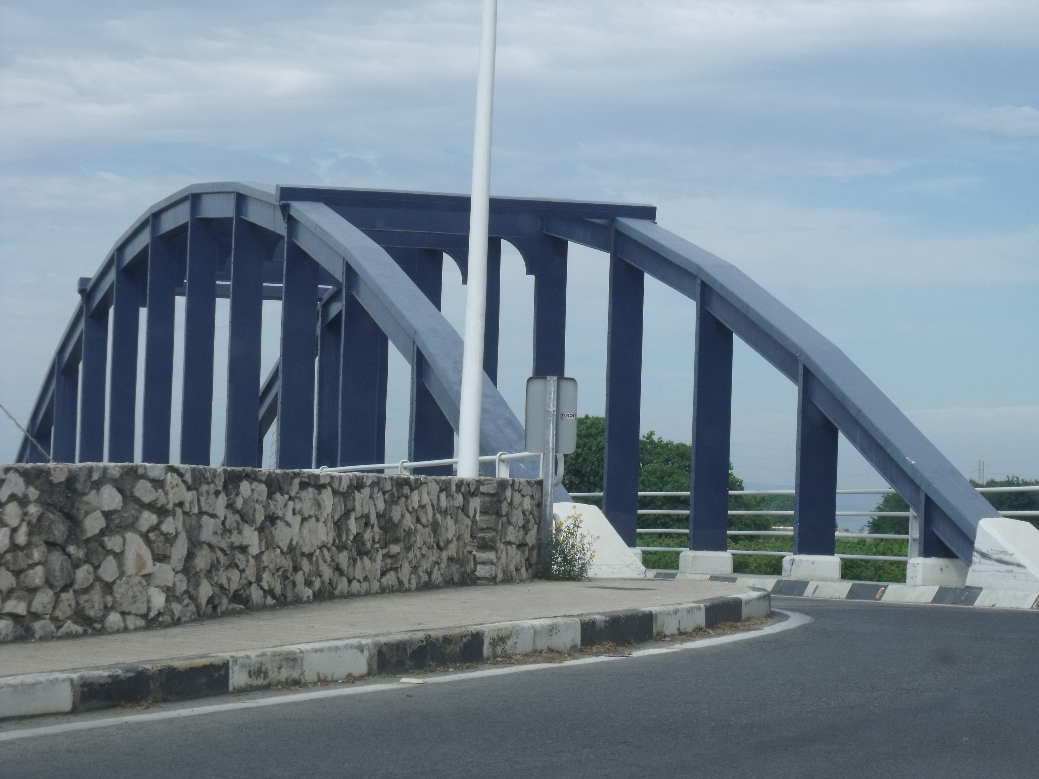 Puente de hierro sobre el río Júcar en la carretera entre Sueca y Riola